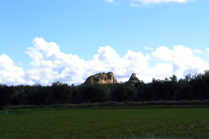 Castillo de Dos Hermanas (Navahermosa)